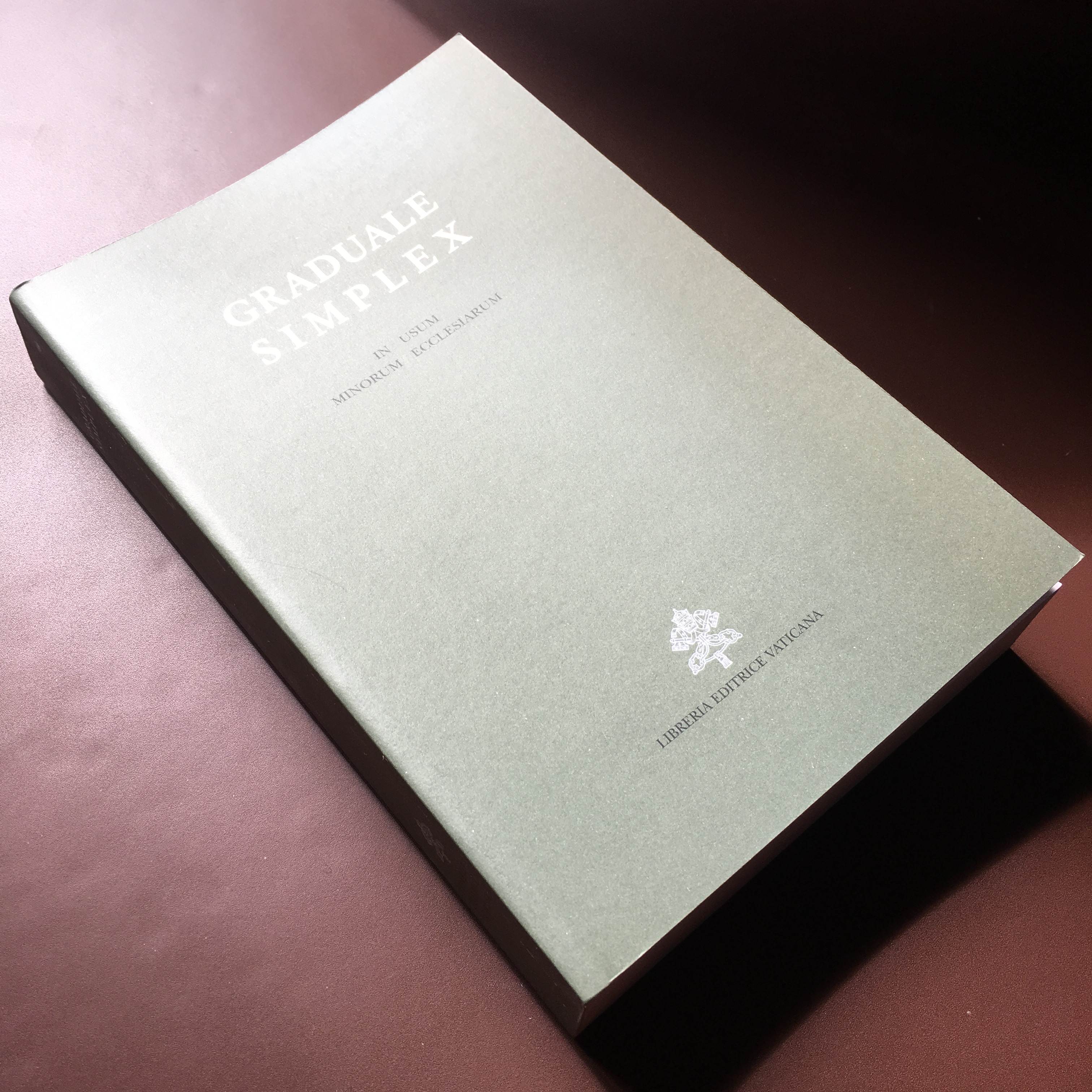 Couverture du Graduale Simplex.